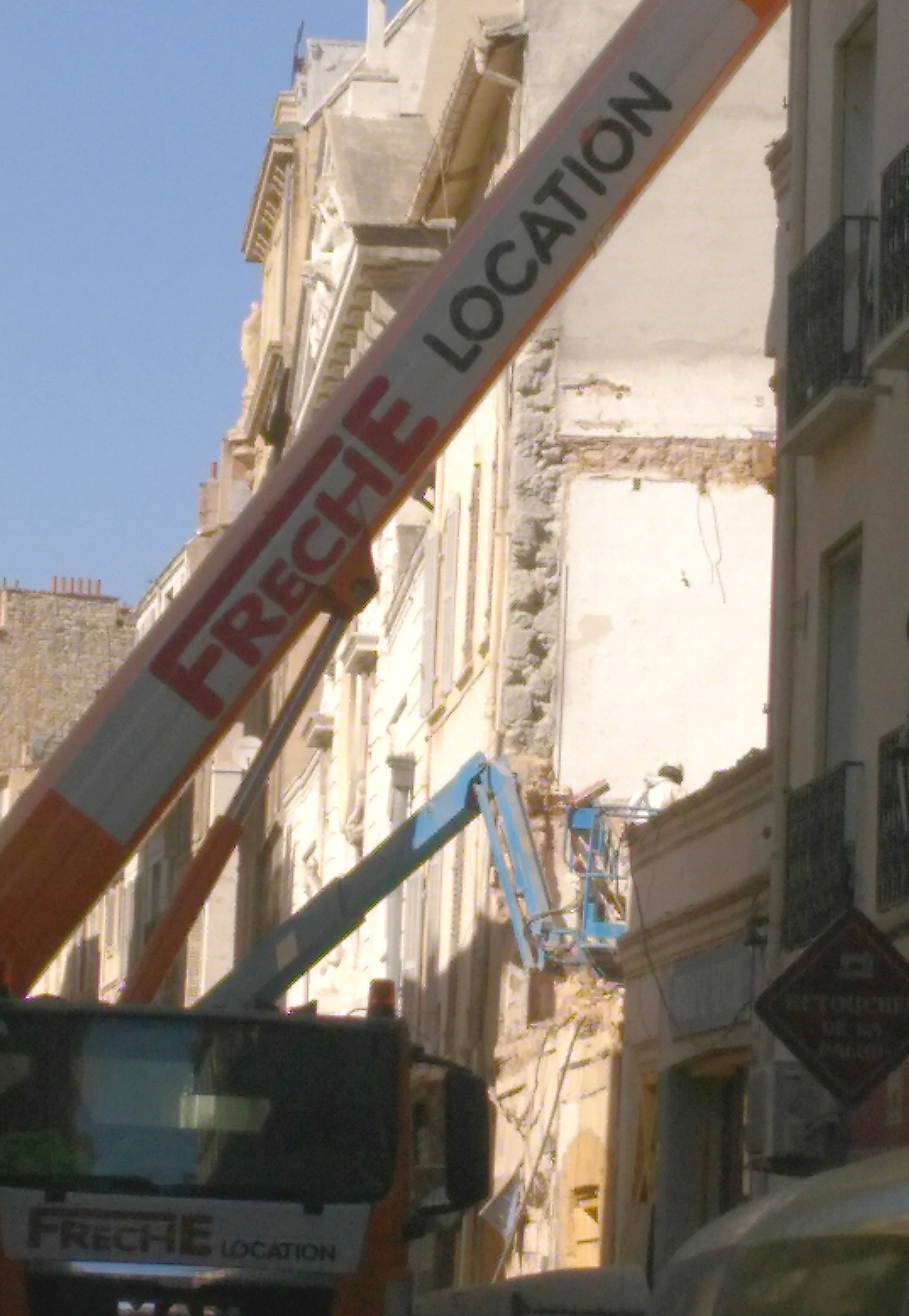 Engins de démolition à côté de l'église de La Trinité-La Palud